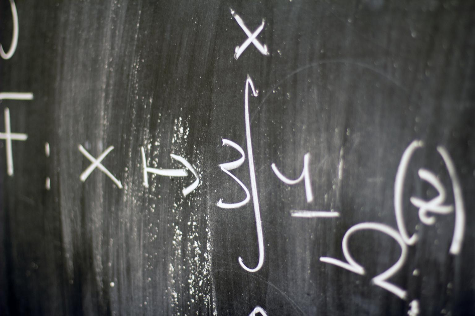 Photo du Centre de mathématiques Laurent Schwartz (CMLS) de l'École polytechnique